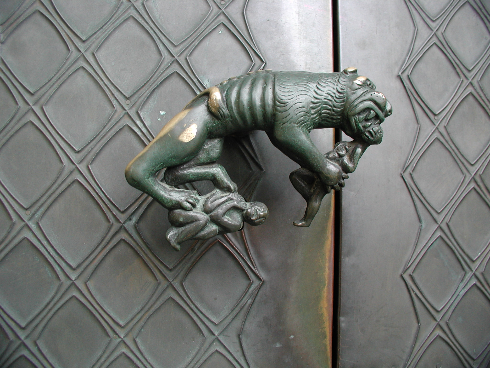 Huerth-Berrenrath